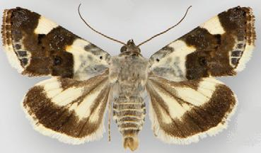 Acontia lucida